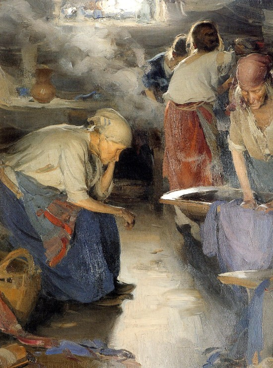 2nd version